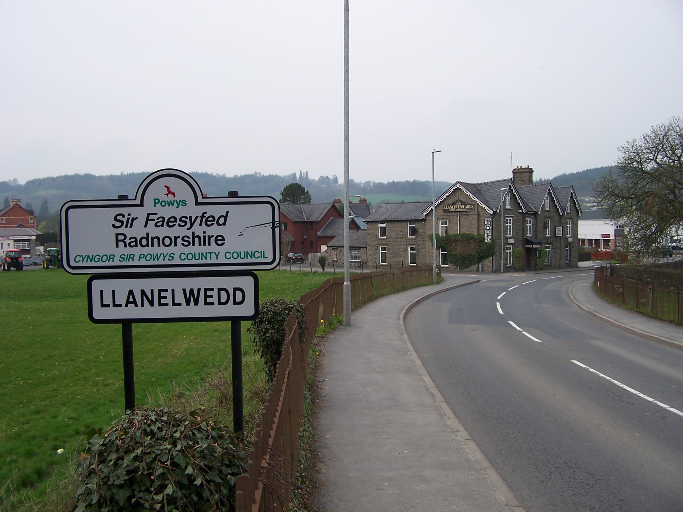 Arwydd ffordd Llanelwedd Llanelwedd Road Sign Arwoedh-fordh Llanelwedd